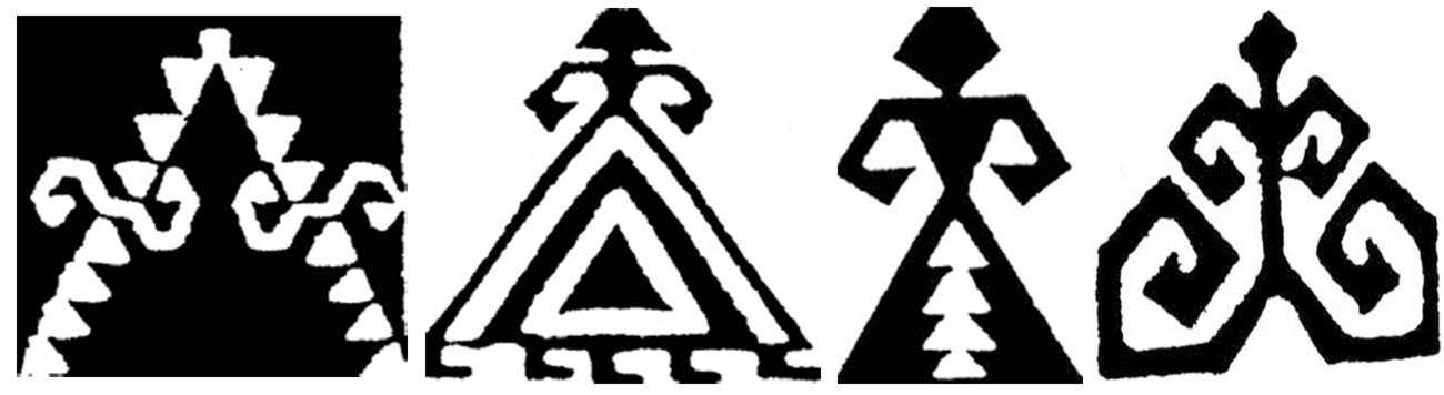 Einige Beispiele für Eibelinden